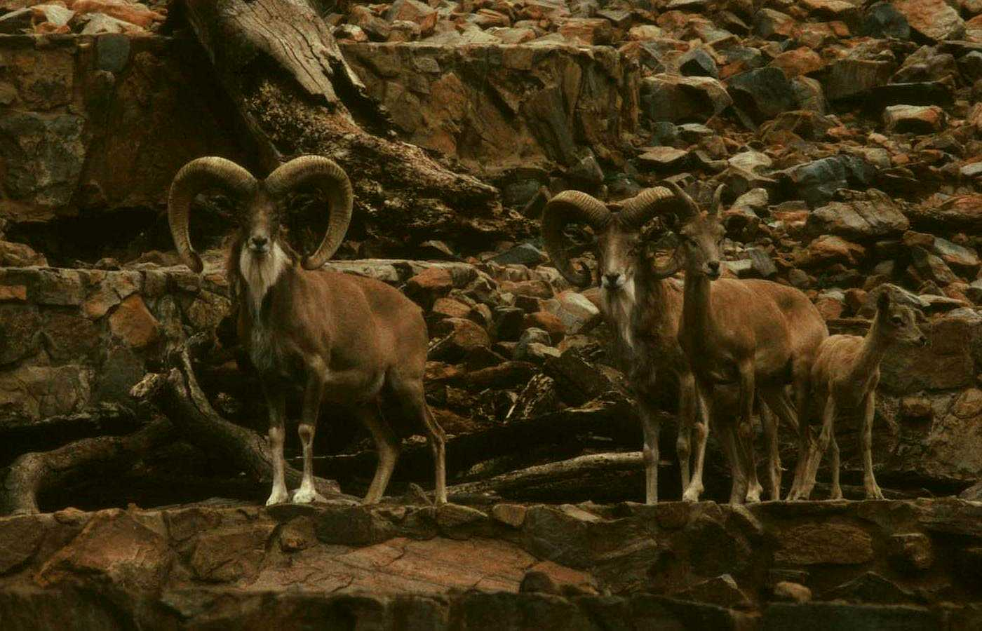 Urials (Ovis vignei arkal) at Pretoria Zoo